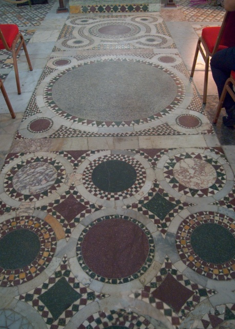 Il pavimento cosmatesco della Chiesa di San Mennato, Sant'Agata de' Goti (BN)